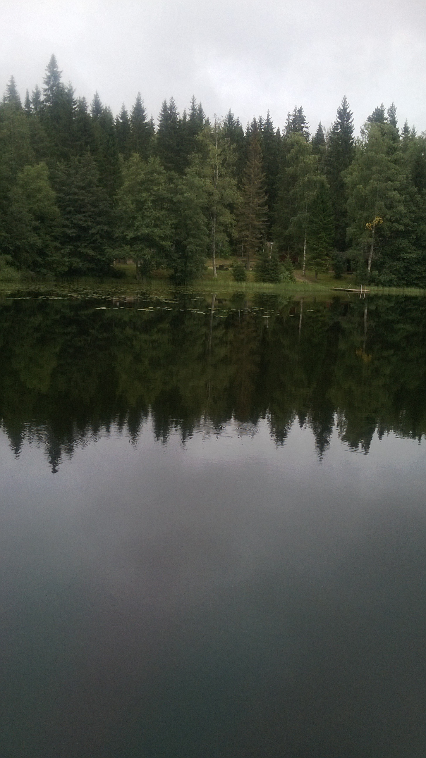 Ladun Maja on ulkoilun tukikohta Taka-Keljossa